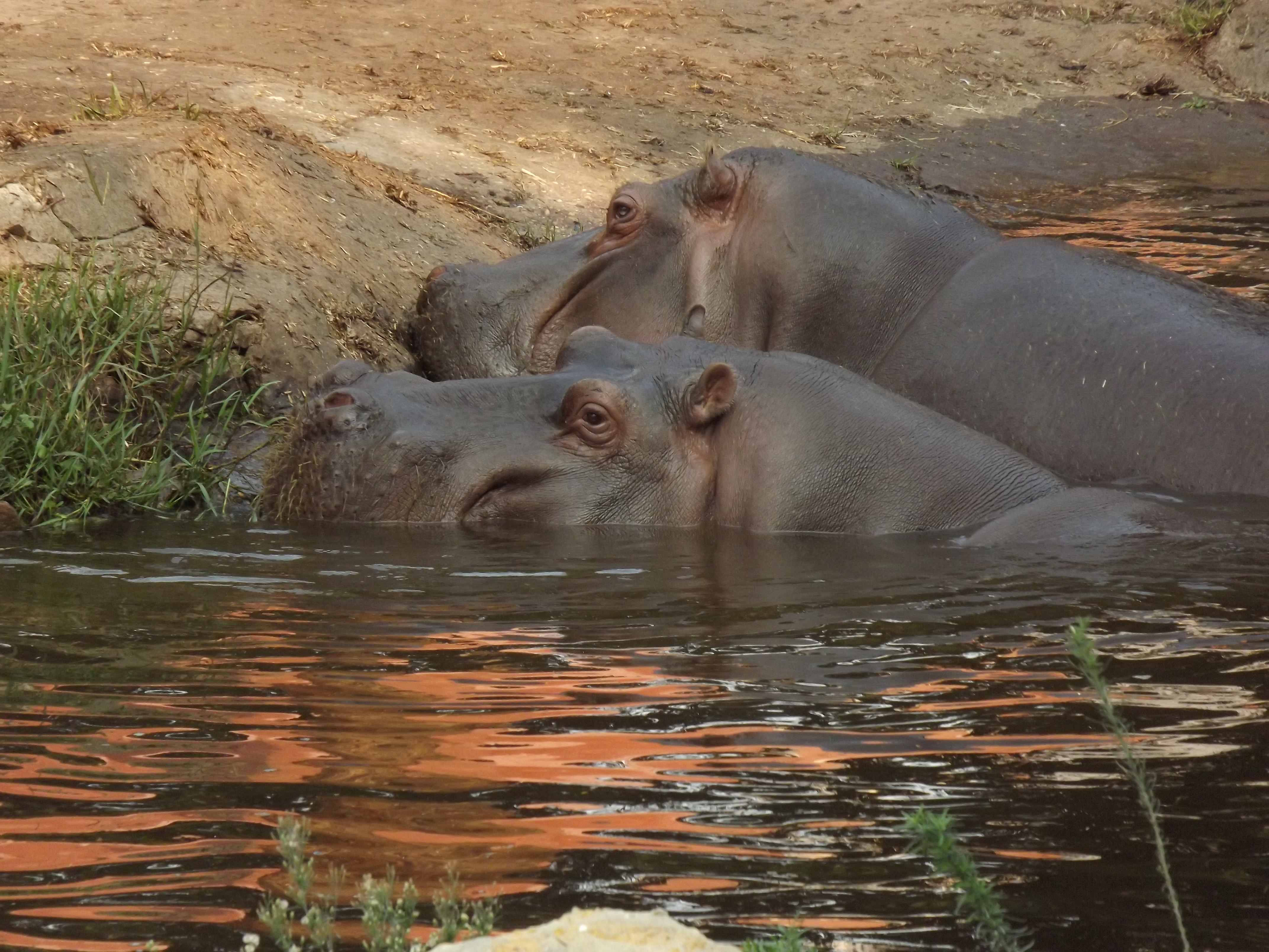 فرس النهر في حديقة حيوان النزهة - الاسكندرية